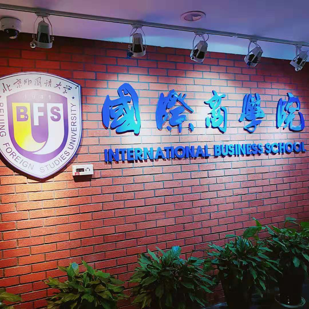 北京外國語大學國際商學院